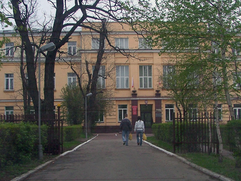 PL, Poland, województwo lubelskie, Chełm